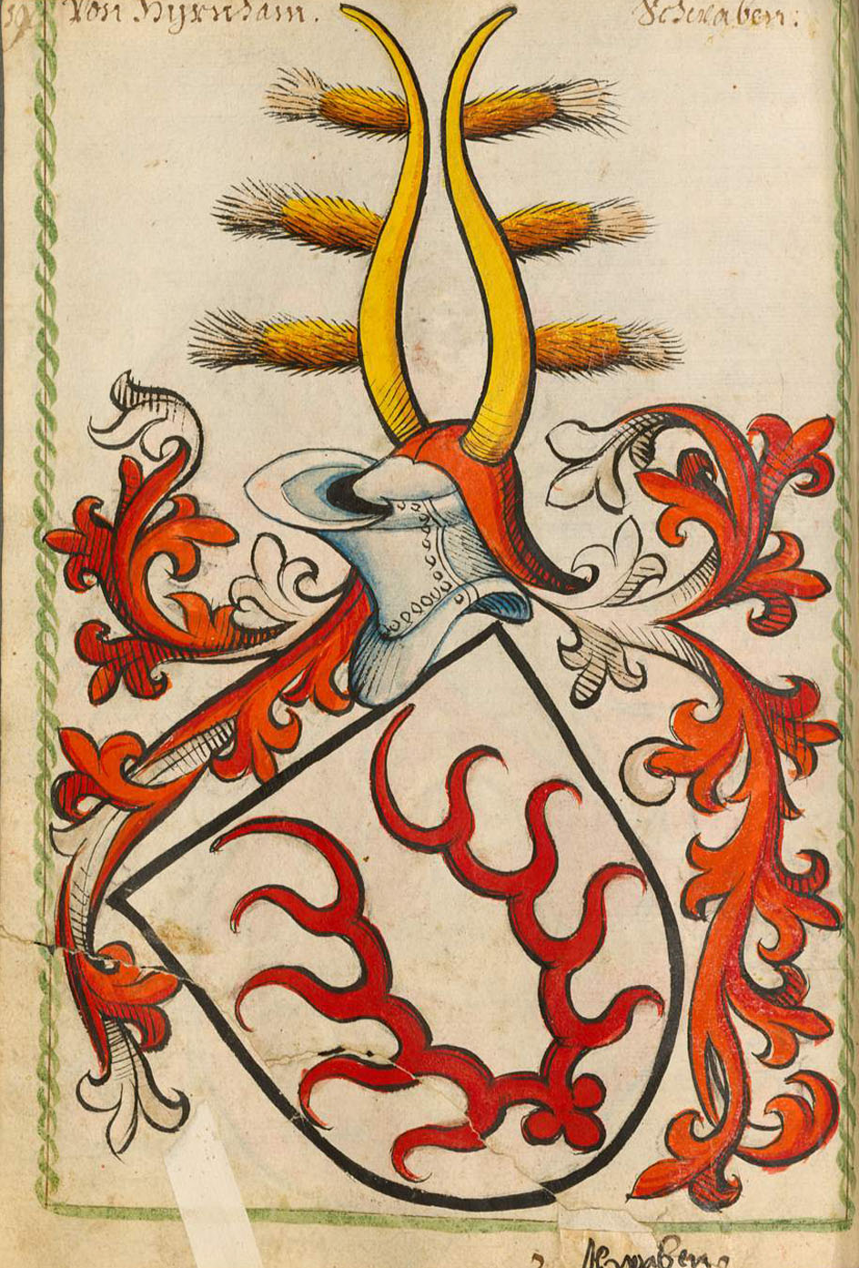 Scheibler'sches Wappenbuch, älterer Teil Hürnheim